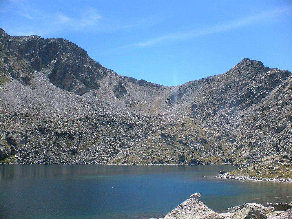 Estany Major de Morrano; la Vall de Boí, Alta Ribagorça, Catalunya